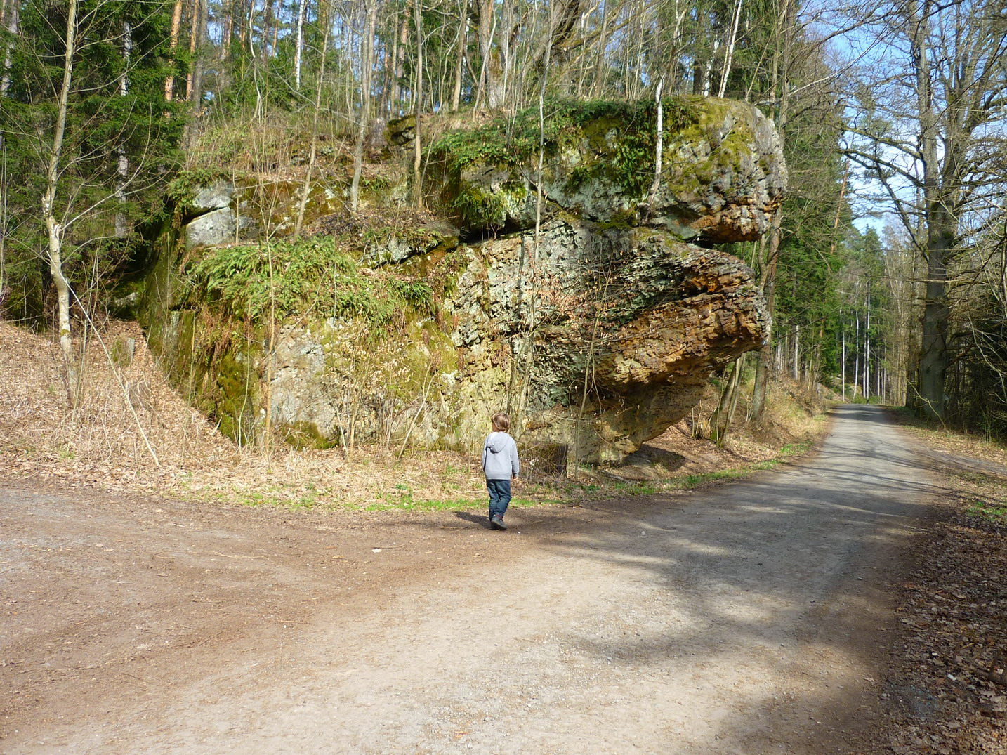 Eckersdorf - Oertelfelsen (Naturdenkmal, Geotop-Nummer: 472R027) im Ortsteil Donndorf